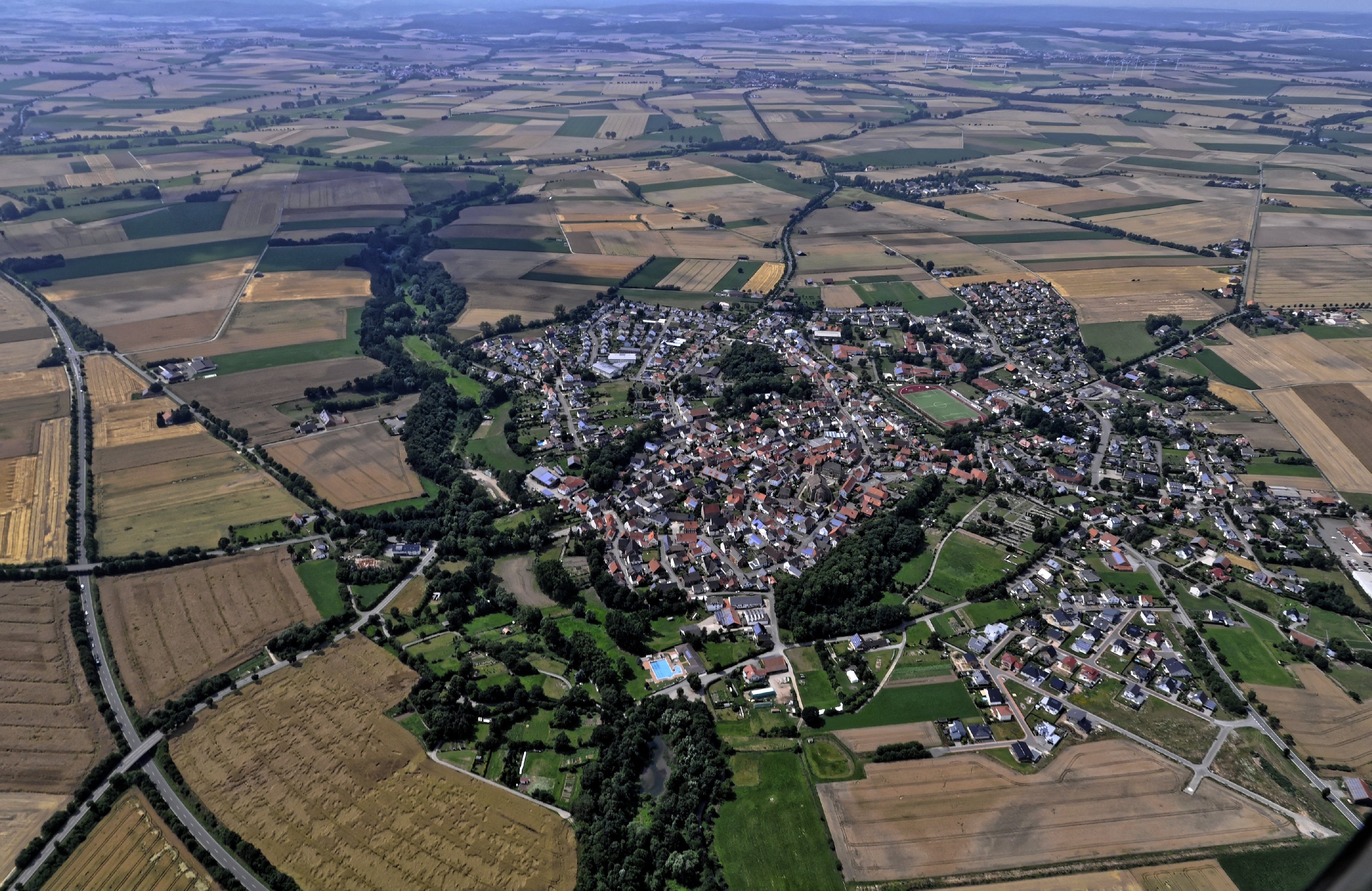 Bilder vom Flug Nordholz-Hammelburg 2015: Borgentreich